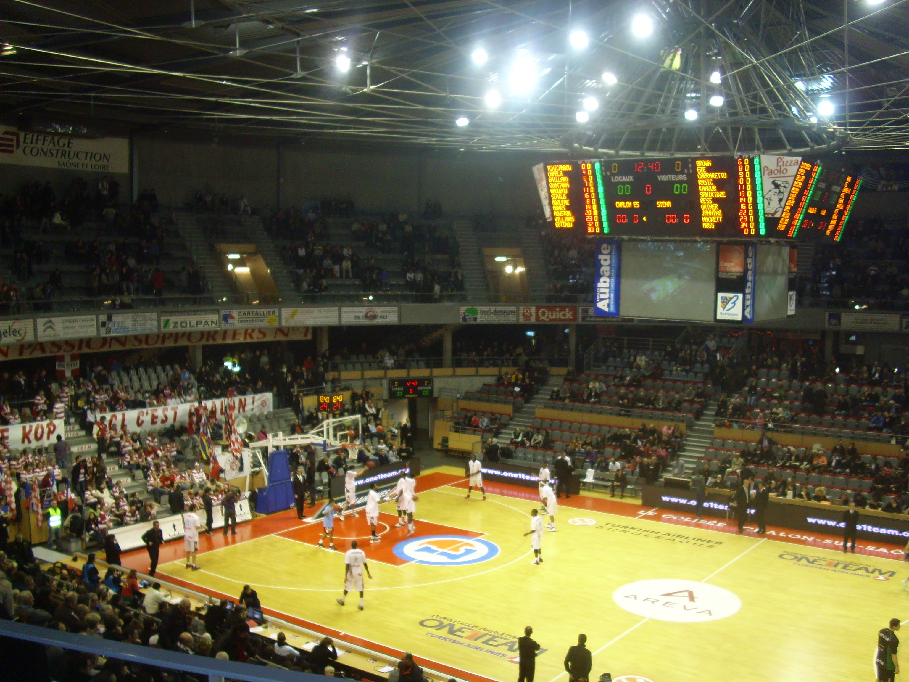 Match d'Euroligue 2012-2013 entre l'Elan Chalon et Sienne